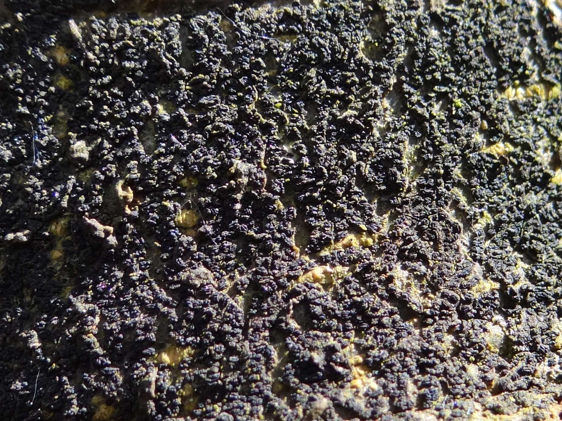 Ascodichaena rugosa on Fagus sylvatica. Location: Poland, Gorce, Ochotnica Górna, dolina potoku Jamne)